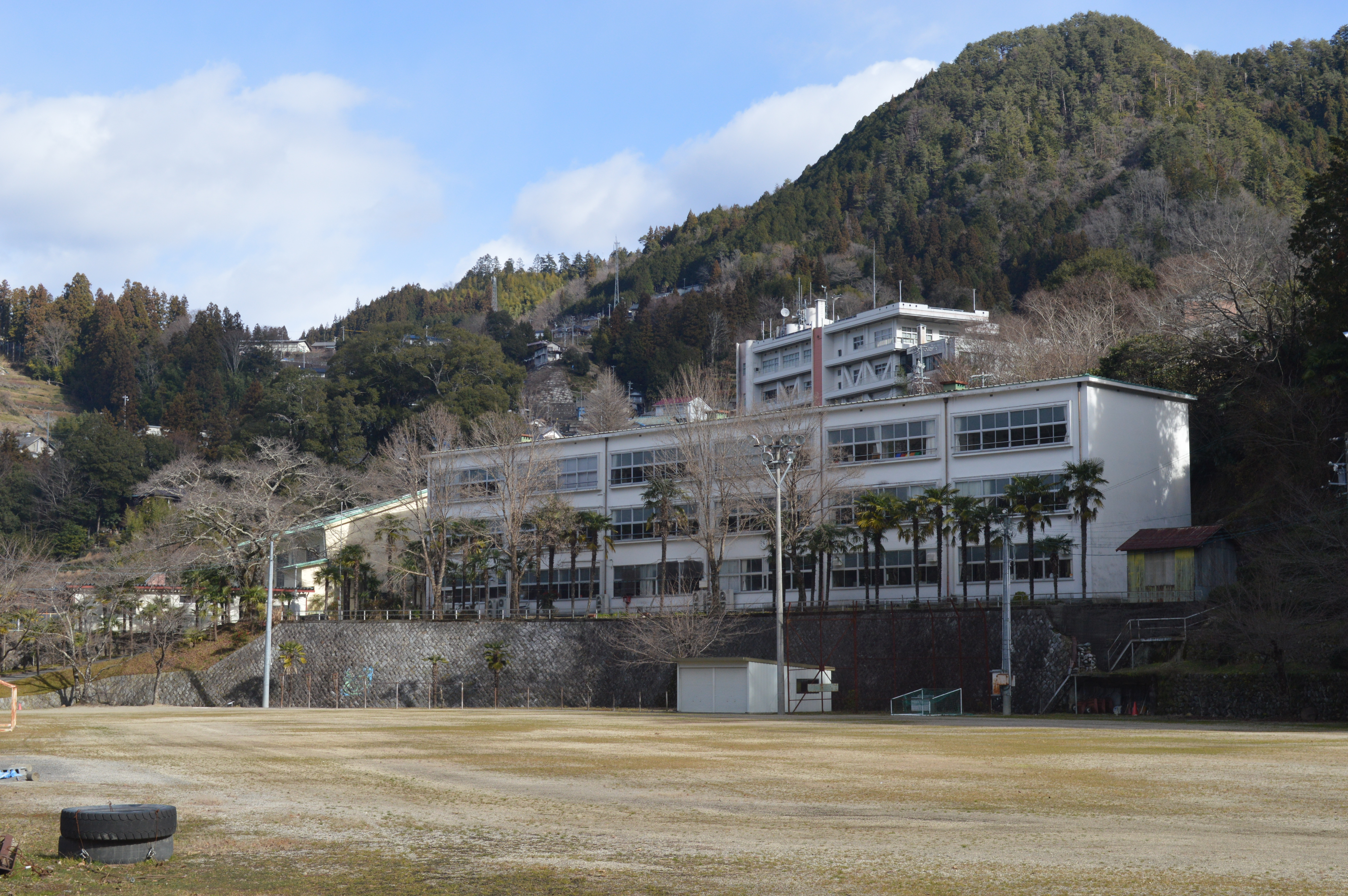 長野県下伊那郡の天龍村立天龍中学校。